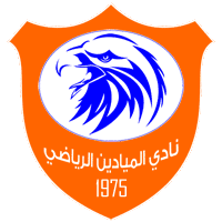 نسور الميادين